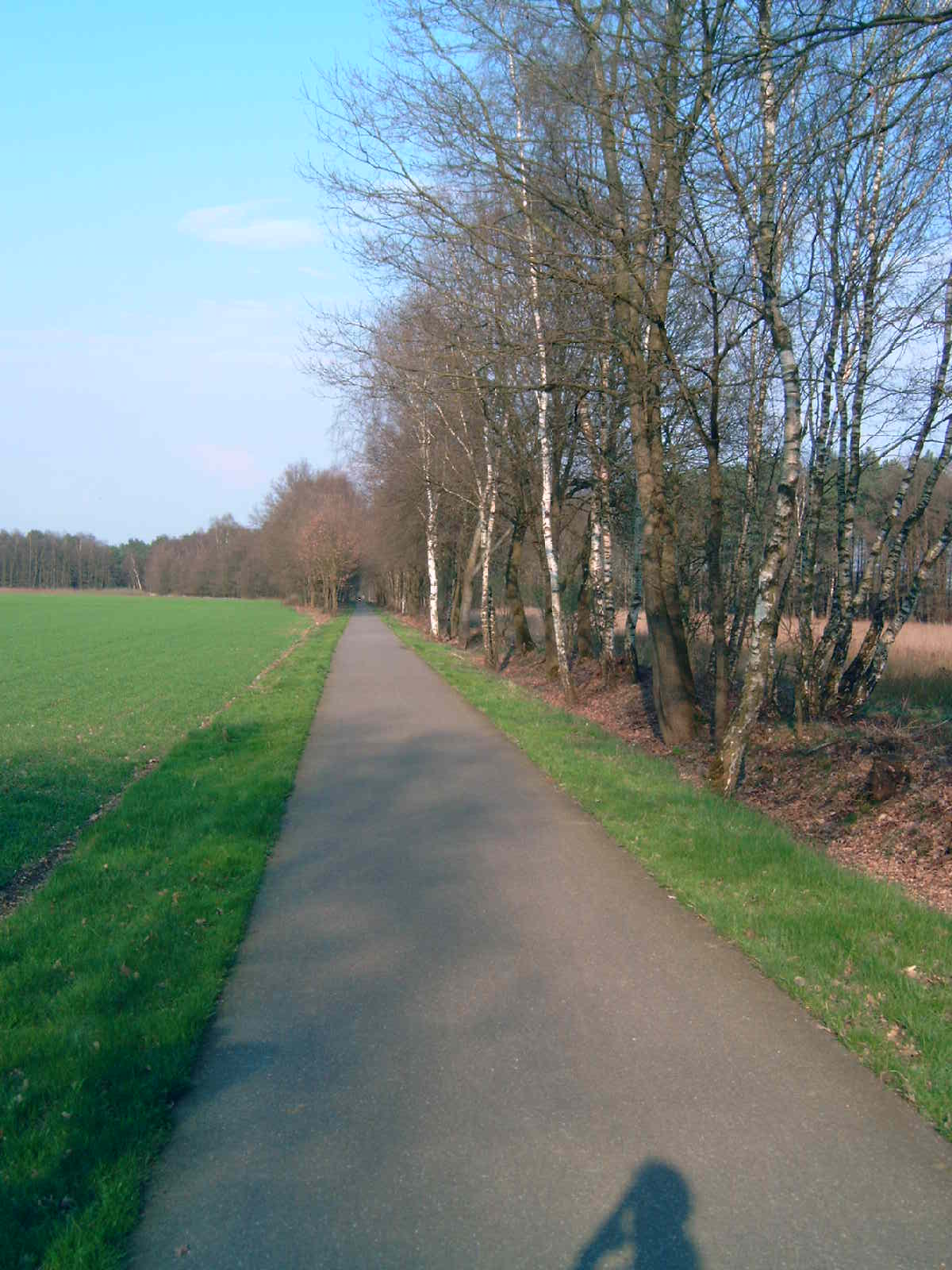 Toeristisch fietspad over het opgebroken deel van spoorlijn 21A (As - Maaseik), tussen de voormalige stations van As en Opoeteren-Dilsen.